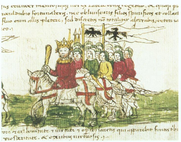 Barbarossa auf dem dritten Kreuzzug, lat. Manuskript, 15. Jahrhundert. - Venedig, Biblioteca Nazionale Marciana